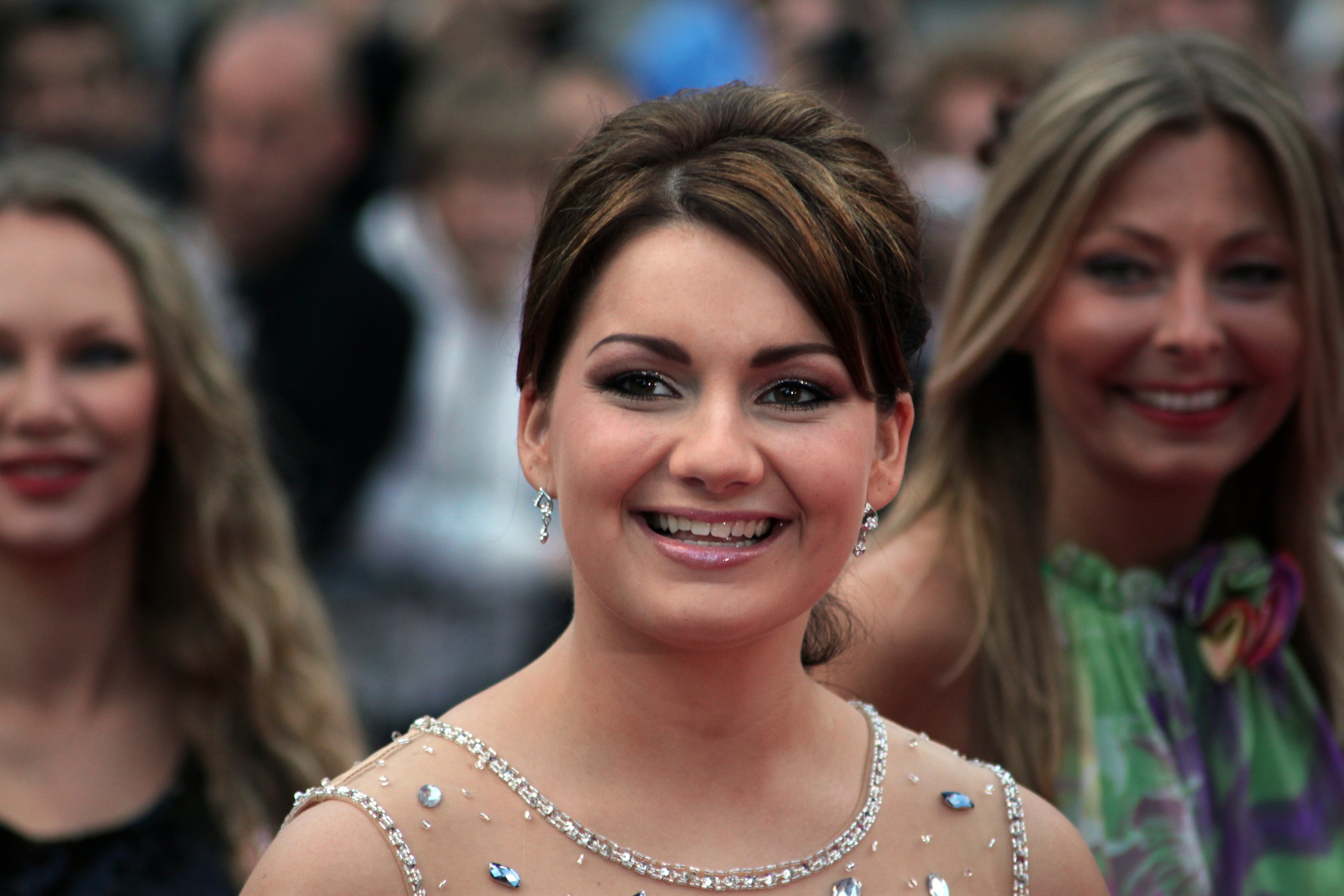 Foto: Vincent Hasselgård, Aktiv I Oslo.no